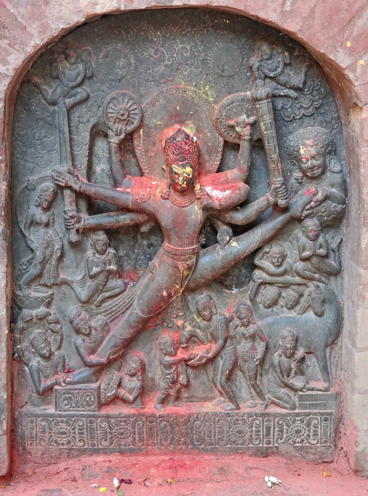 Sculpture Vishnu Vikrant (appelée au Népal : Bishnu Vikrant) montrant Vishnou (Bishnu au Népal) sous la forme de son avatar : le Nain Vâmana (ou Vikrantha) dans le temple de Changu Narayan (VIIème siècle ?) L'avatar de Vishnou le Nain est représenté immense en train d'enjamber les trois mondes (le monde terrestre, les cieux et le monde des dieux) qui avaient été conquis par Bali, le roi des Anti-Dieux. ___________ Le temple de Changu Narayan est considéré comme le plus vieux du Népal, il possède un toit en forme de pagode à 2 étages. Il a été reconstruit probablement au XVIIème siècle mais avec des éléments architecturaux et décoratifs beaucoup plus anciens. Ce temple dédié à Narayan est au sommet d'une montagne considérée comme sacrée depuis 464 après notre ère comme en atteste une référence écrite à ce site qui date du règne du roi Licchavi Mandeva mais le site était probablement sacré depuis le 3ème siècle. Dans la cosmologie hindoue, Vishnou lorsqu'il repose sur le serpent Ananta (Shesha) est appelé Nârâyana (Narayan) c'est à dire "Reposant sur les eaux" ou "Demeure-de-l'Homme" ou encore "Demeure-du-savoir". Nârâyana, qui signifie aussi "Refuge universel", est une des 24 images de Vishnou d'après le Rupa Mandana. Article de Wikipedia sur Narayana (Narayan au Népal) Article de Wikipedia sur Changu Narayan